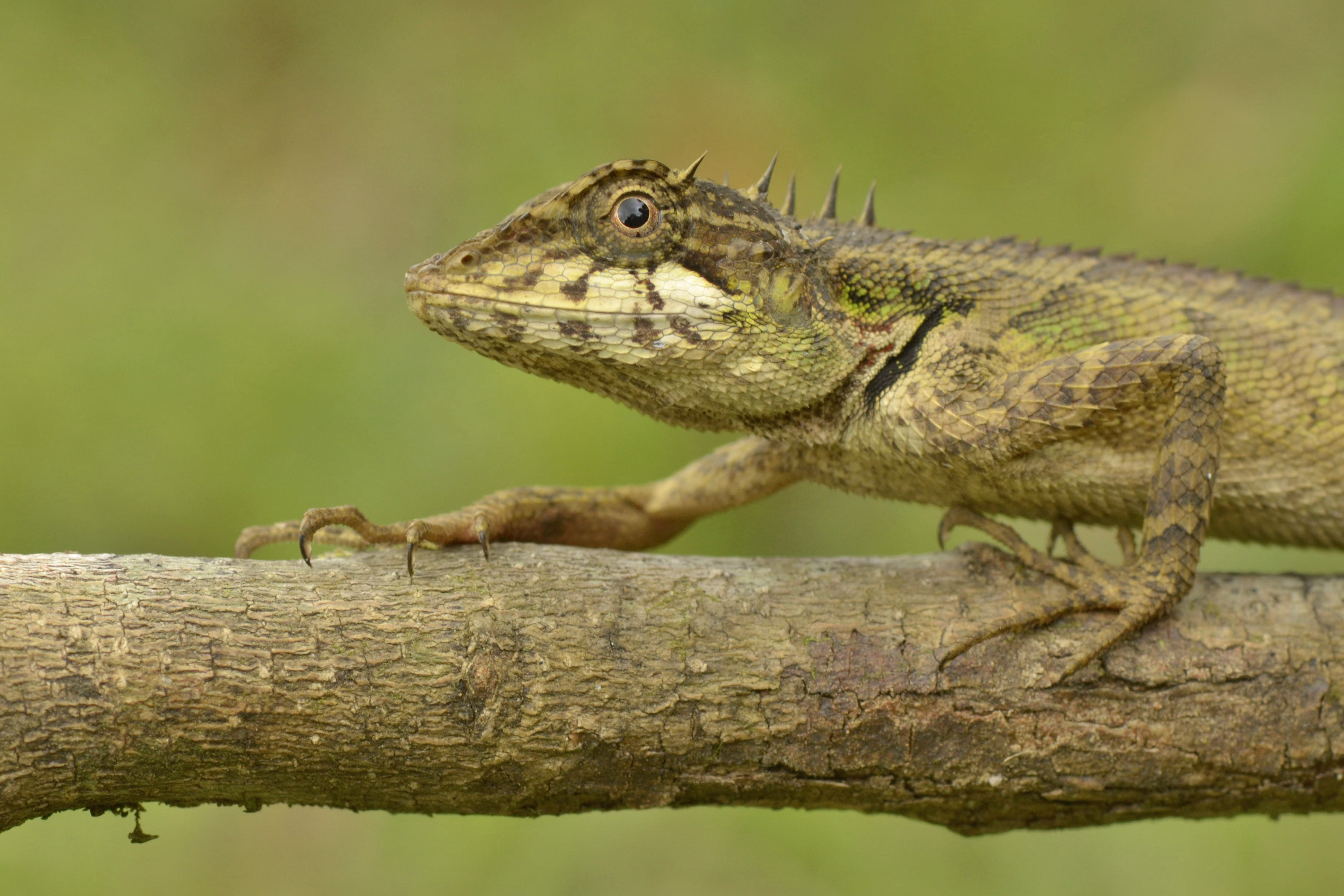 മുള്ളോന്ത്